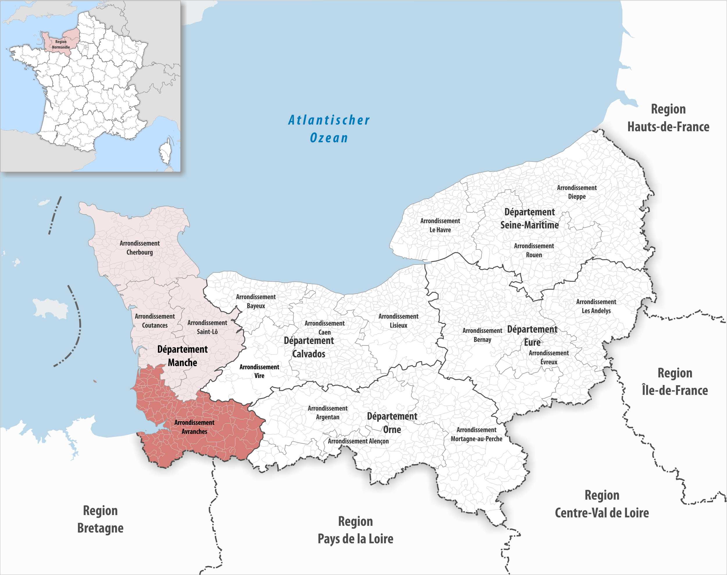 Lage des Arrondissements Avranches